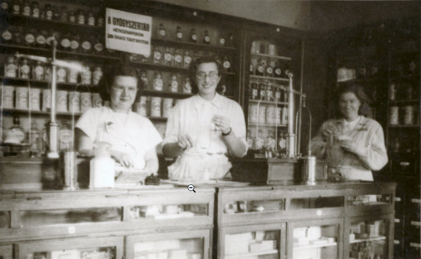 Pestszentlőrinc, Állami lakótelepi patikája